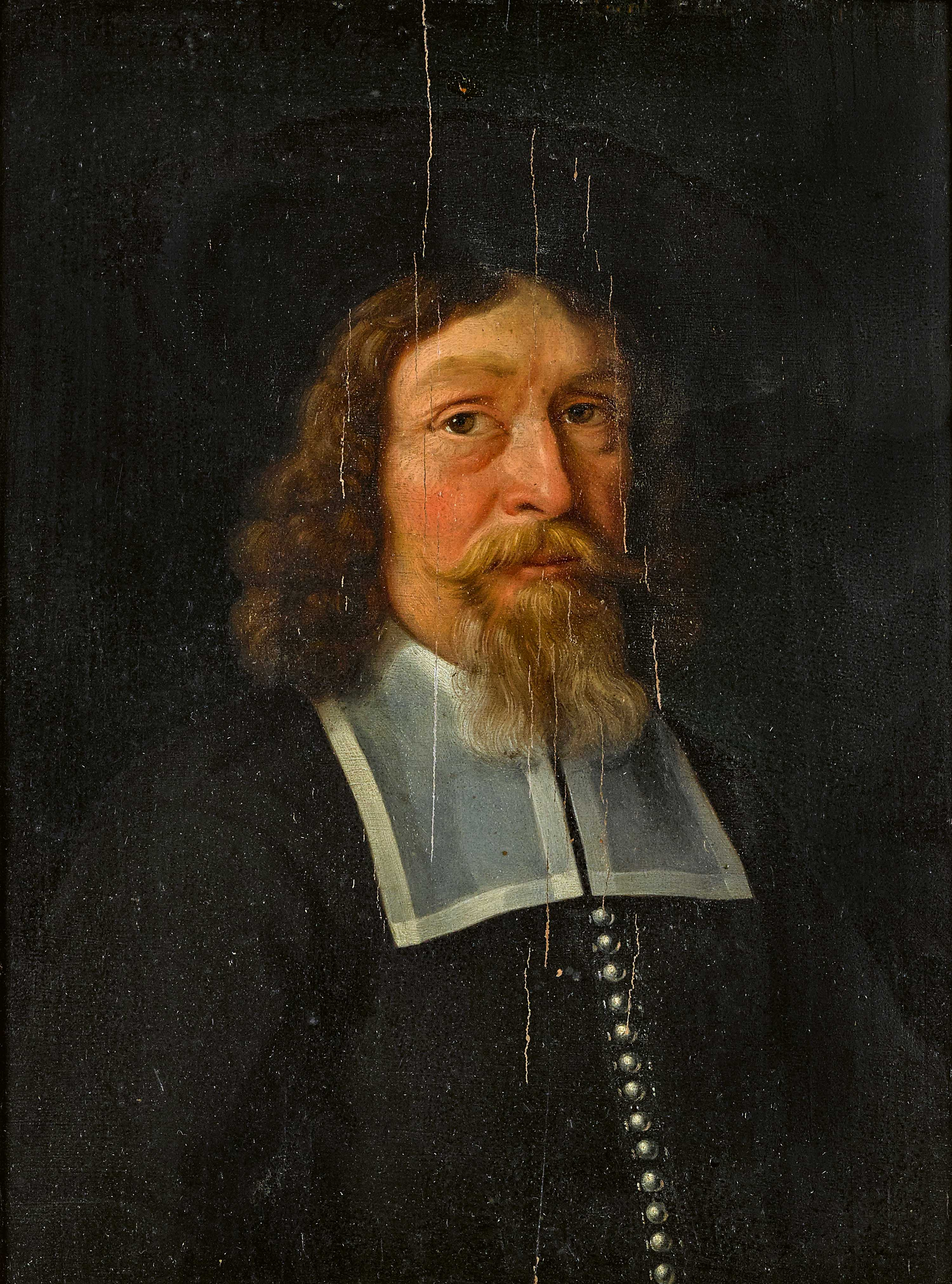 Bildnis David Knopf (1623-1681), Notar, Appellationsschreiber, Landschreiber zu Interlaken.